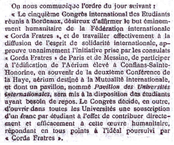 Article qui parle d'une décision du congrès de la Corda Fratres tenu à Bordeaux en 1907.